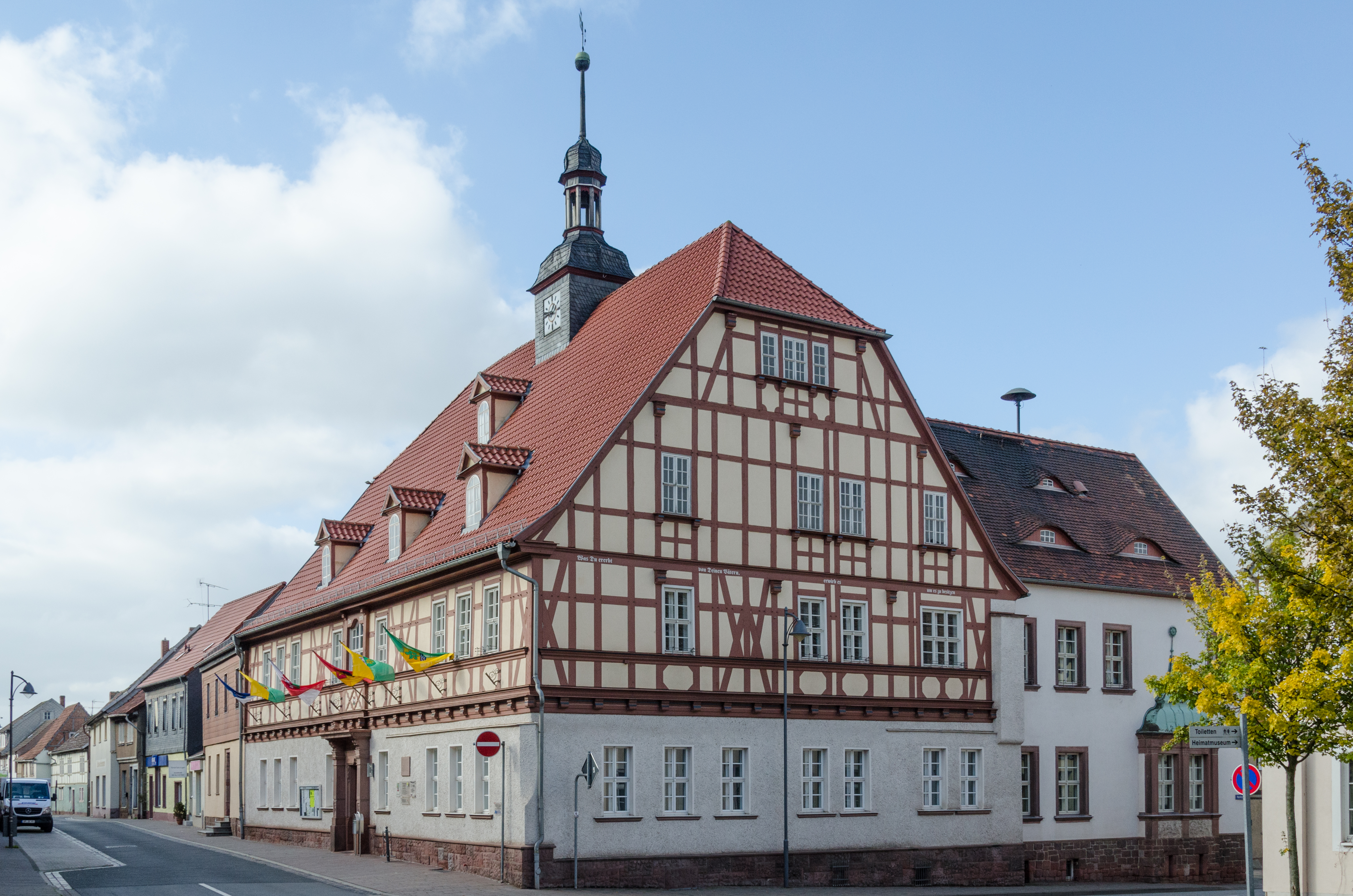 Kelbra, Lange Straße 8, Rathaus